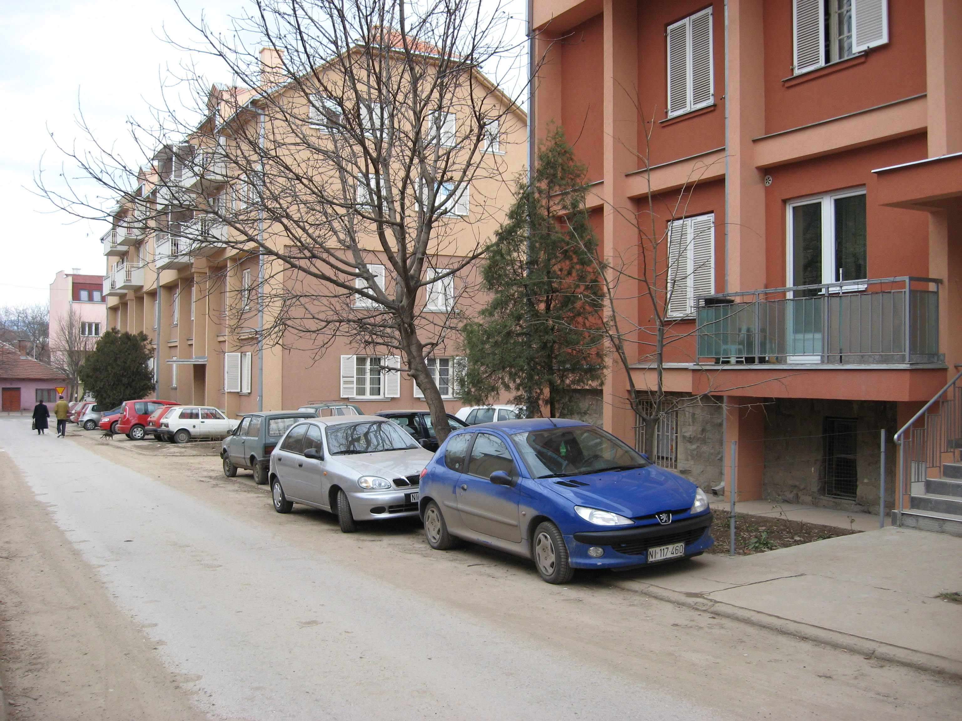 Naselje Rasadnik. Dragan Cvetković, Niš.